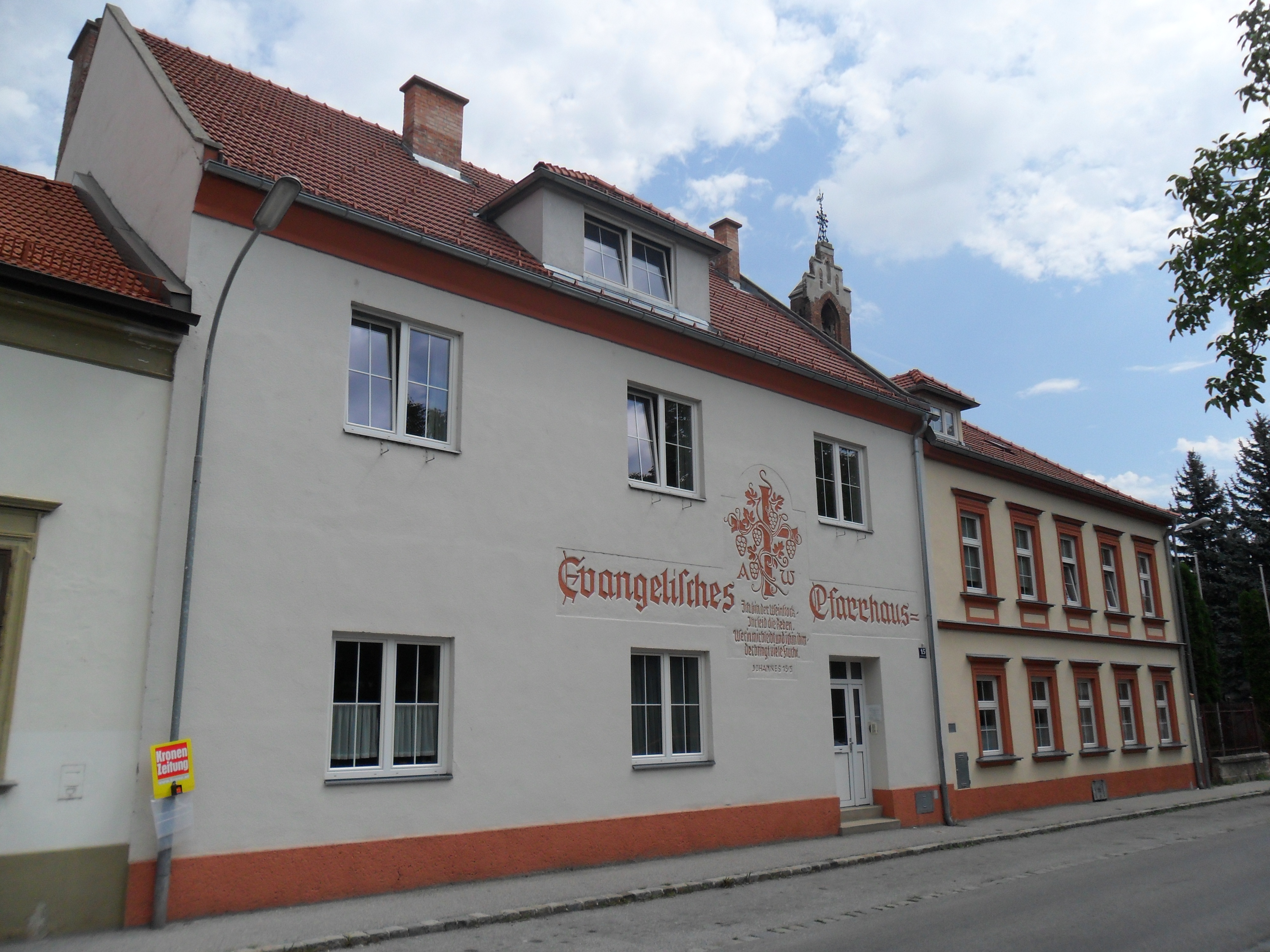 Evangelisches Pfarrhaus in Neunkirchen